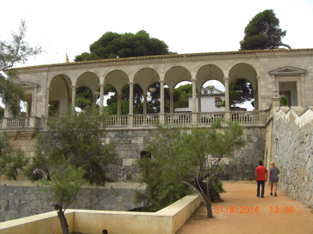 Loggia Senya Blanca (S'Agaró)